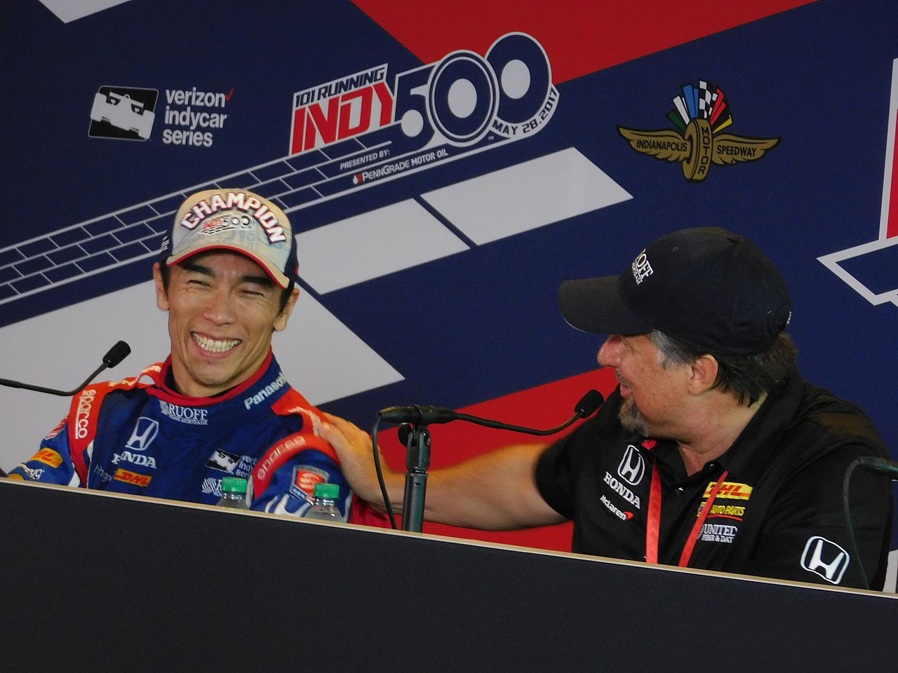 takuma sato michal andretti